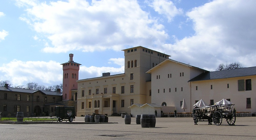 Das Krongut Bornstedt am Park Sanssouci